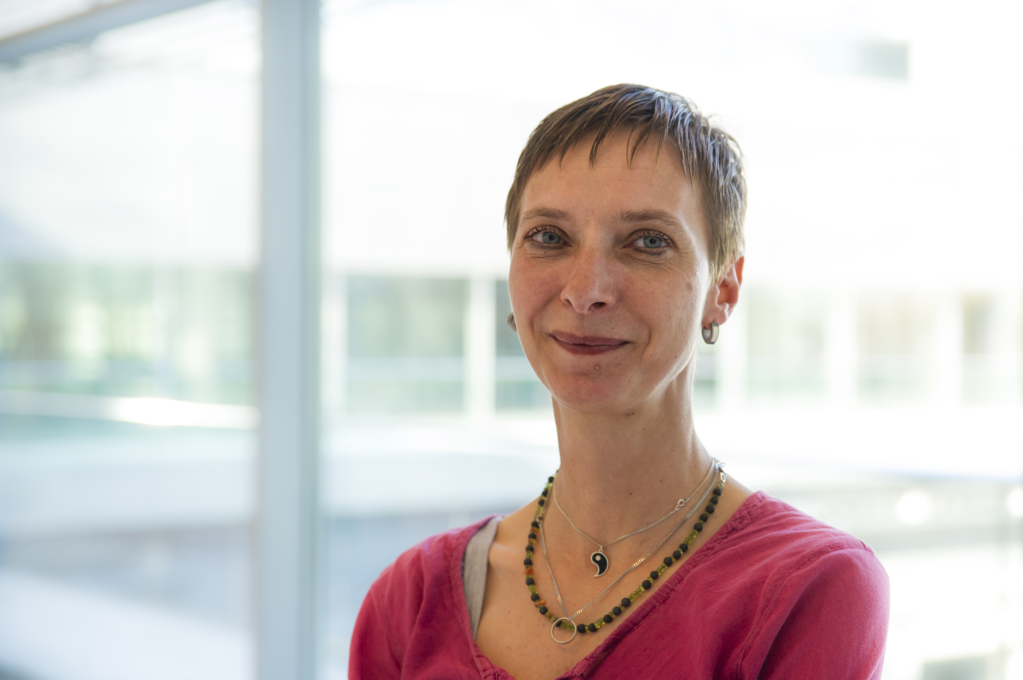 Halina Wawzyniak (* 17. Juli 1973 in Königs Wusterhausen) ist eine deutsche Rechtsanwältin und Politikerin. Bis Juni 2012 war sie stellvertretende Vorsitzende der Partei Die Linke. Seit dem 3. Bundesparteitag fungiert sie nur noch als Beisitzerin im Vorstand. Seit der Bundestagswahl 2009 ist sie Mitglied des Deutschen Bundestages.